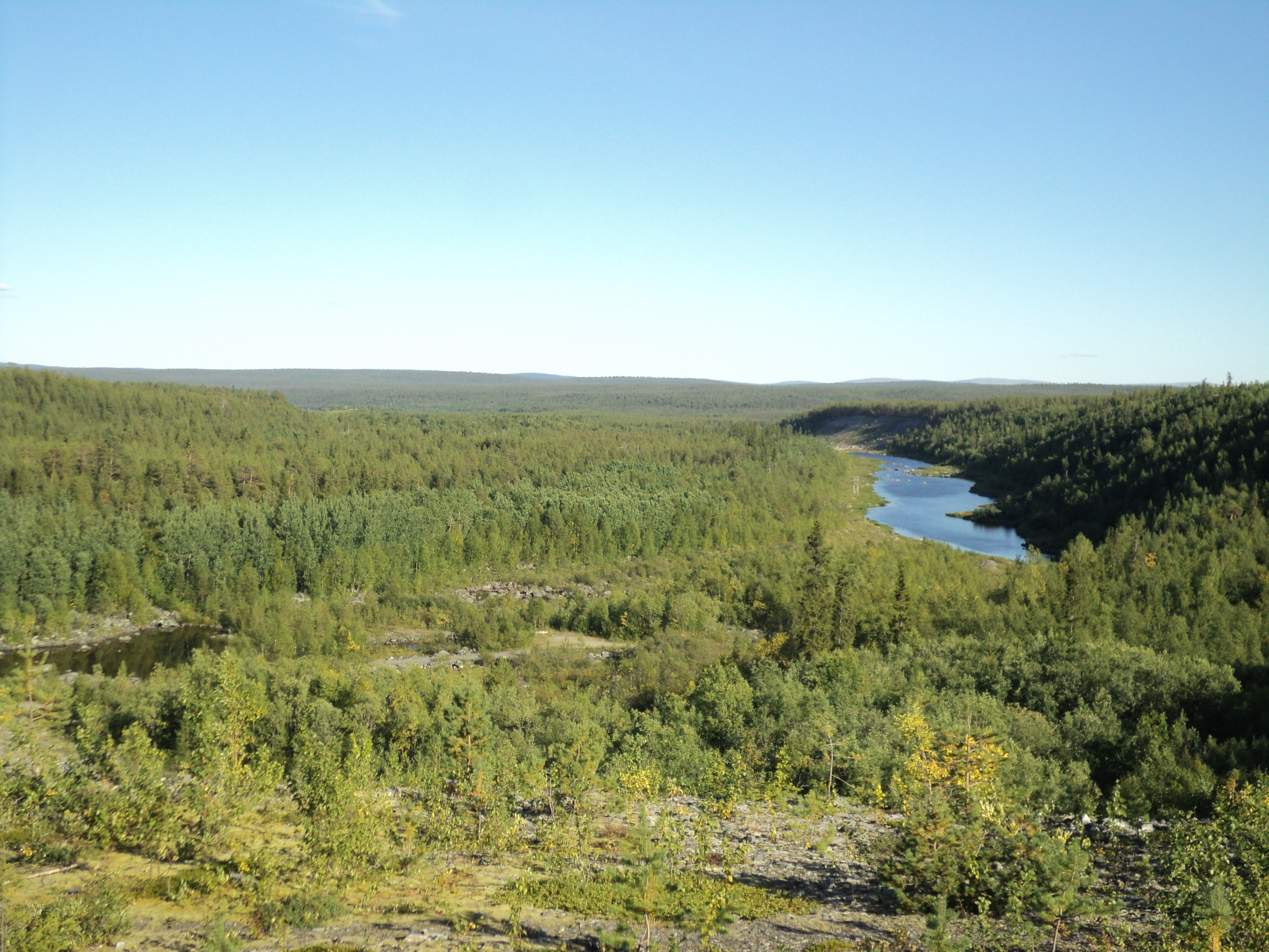 Долина Туломы